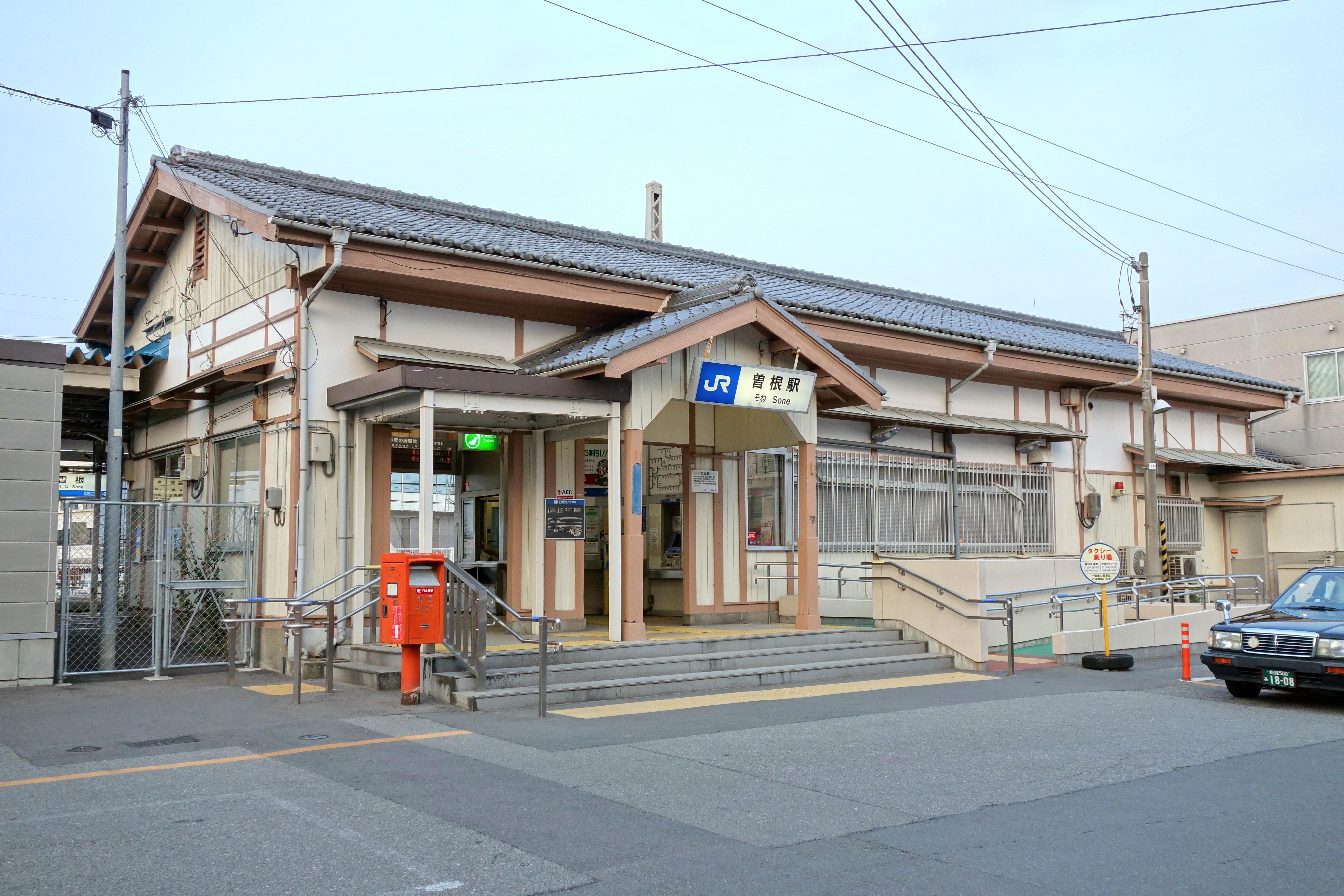 曽根駅 （JR神戸線）